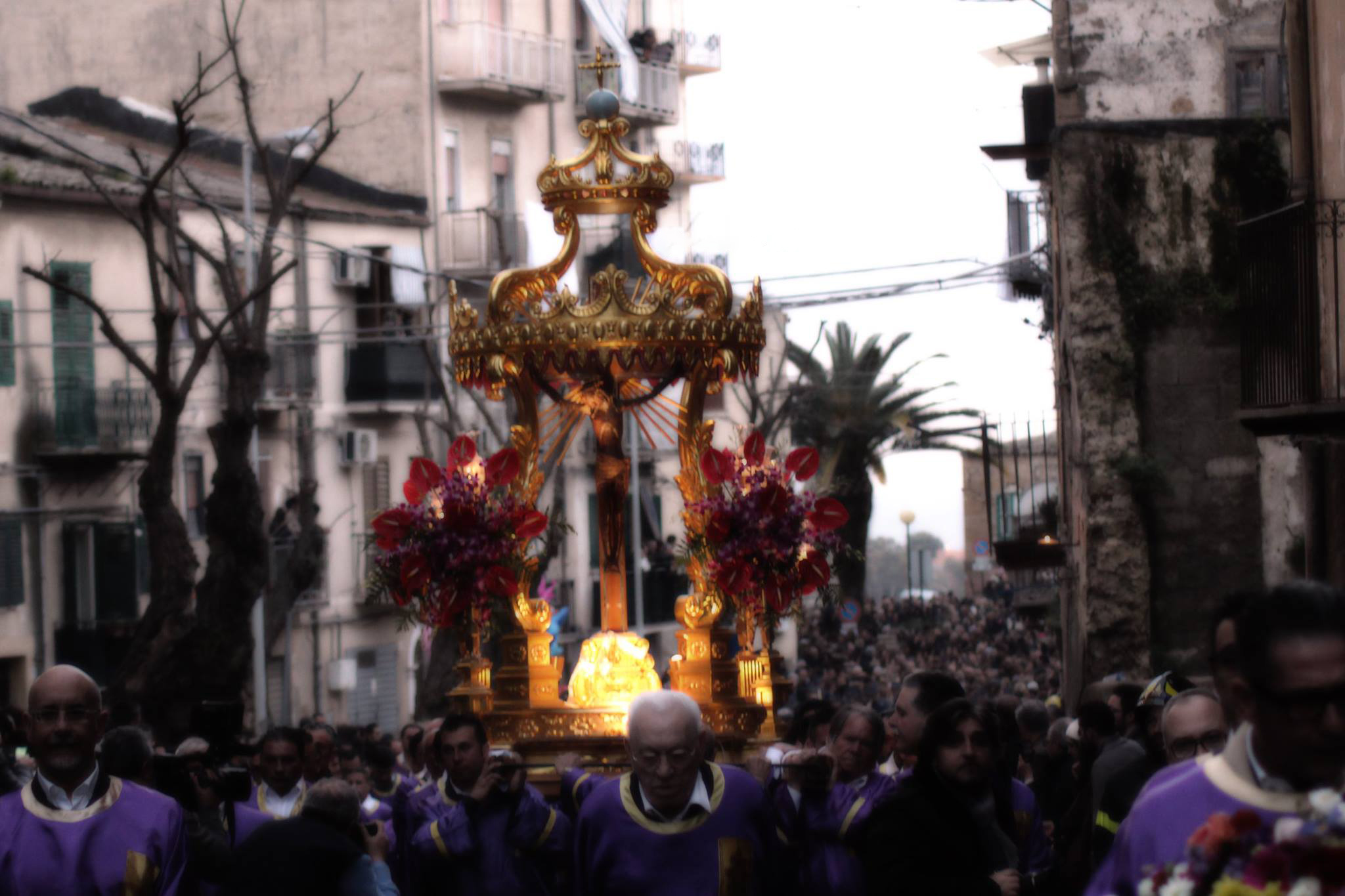 Attimi di passione ! Venerdi Santo